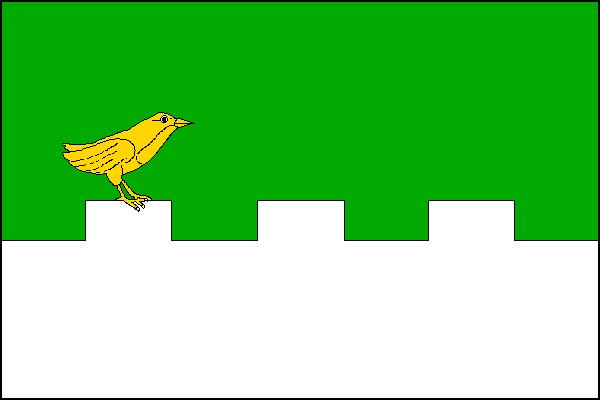 Vlajka obce Staré Město (okres Bruntál)